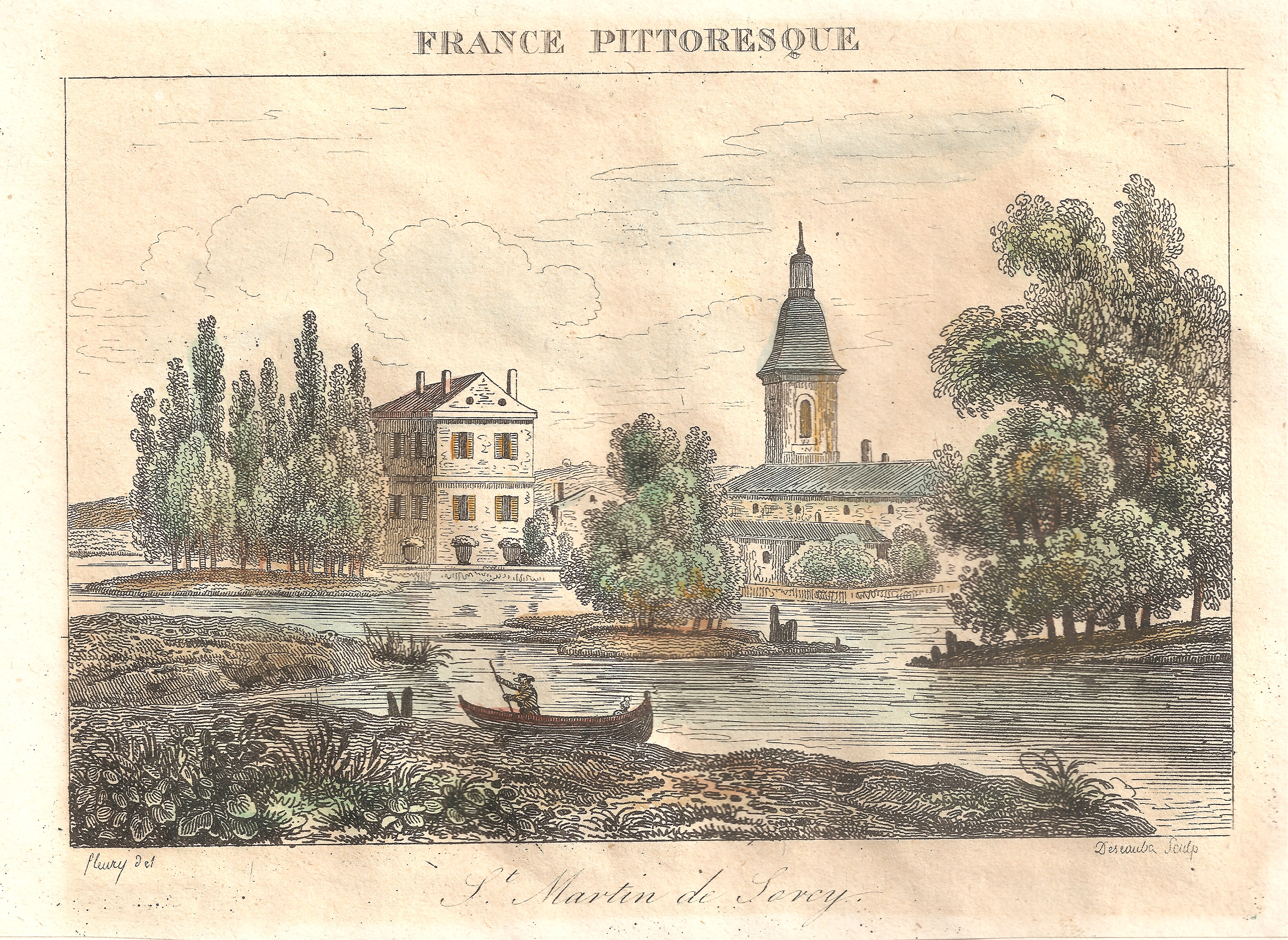 St Martin de Sorcy - Illustration extraite de France pittoresque ou description pittoresque, topographique et statistique des départements et colonies de la France par Abel Hugo (1798-1855), Delloye, éditeur, Paris 1835 - Gravure sur acier dessinée par Fleury, gravée par Desaulx, aquarellée à la main.